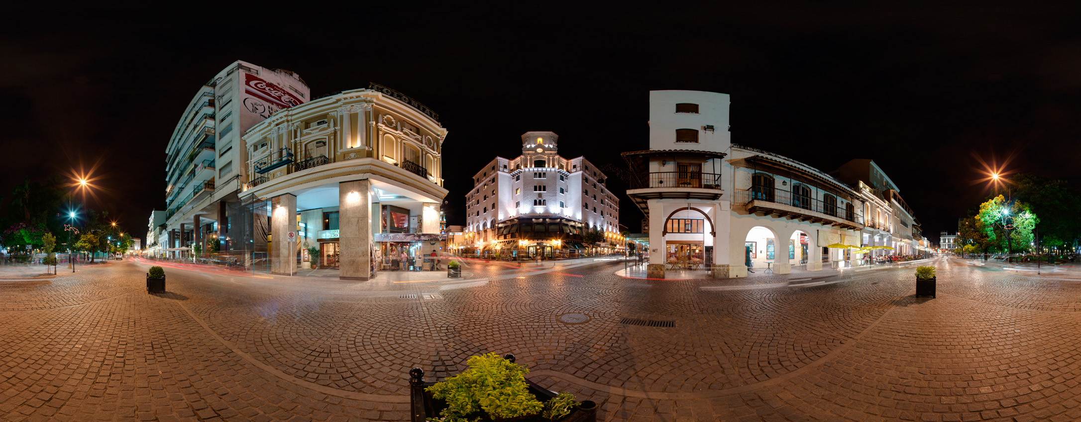 Panorama de los edificios alrededor de la plaza 9 de Julio, Salta. En el medio se encuentra el Hotel Salta.